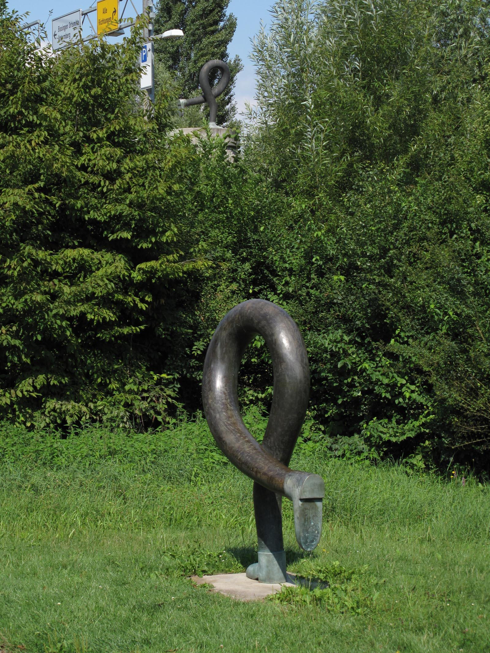 Fritz Schwegler, Kunstläuferin (2-teilig), 1999, - Deutschland, Baden-Württemberg, Bietigheim-Bissingen, Langewiesenbrücke